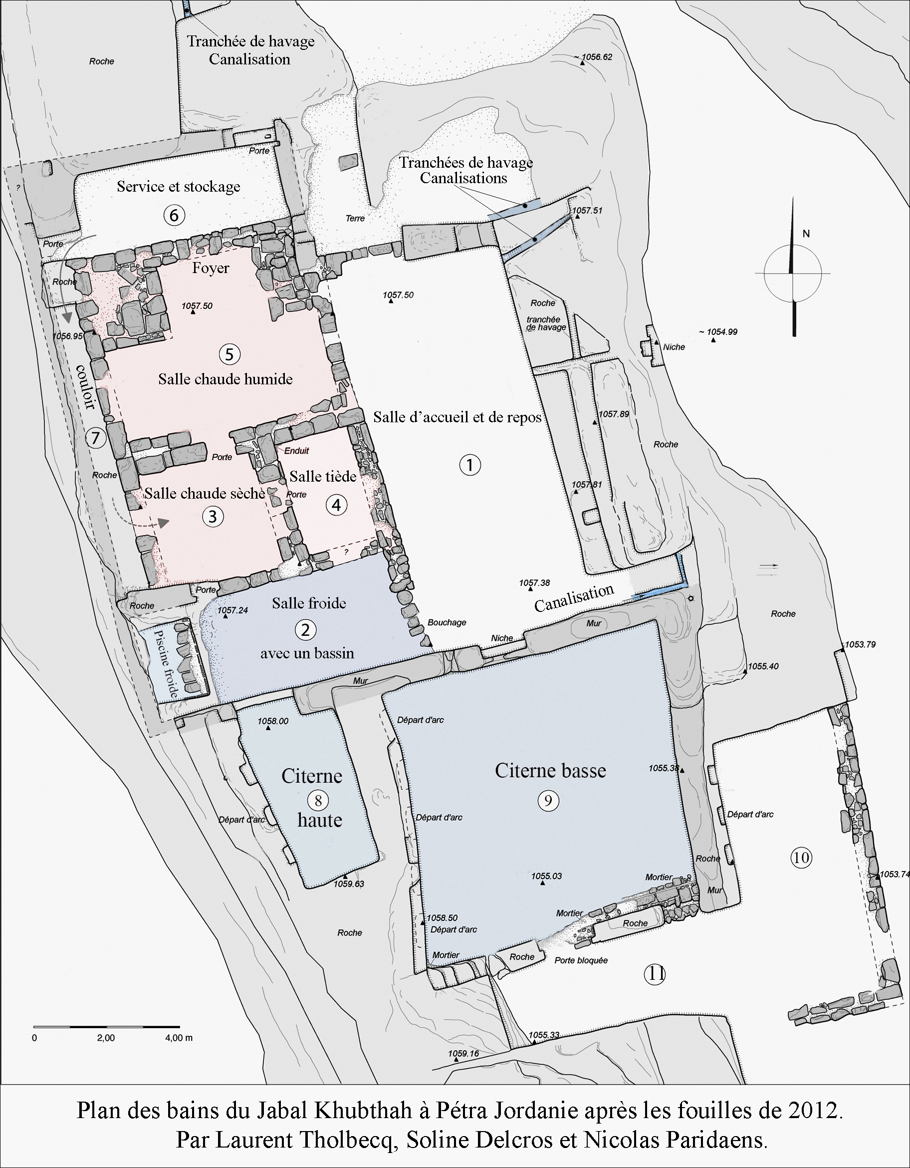 Plan des thermes du djebel Khubthah après les fouilles de 2012. Avec l'autorisation de Laurent Tholbecq.